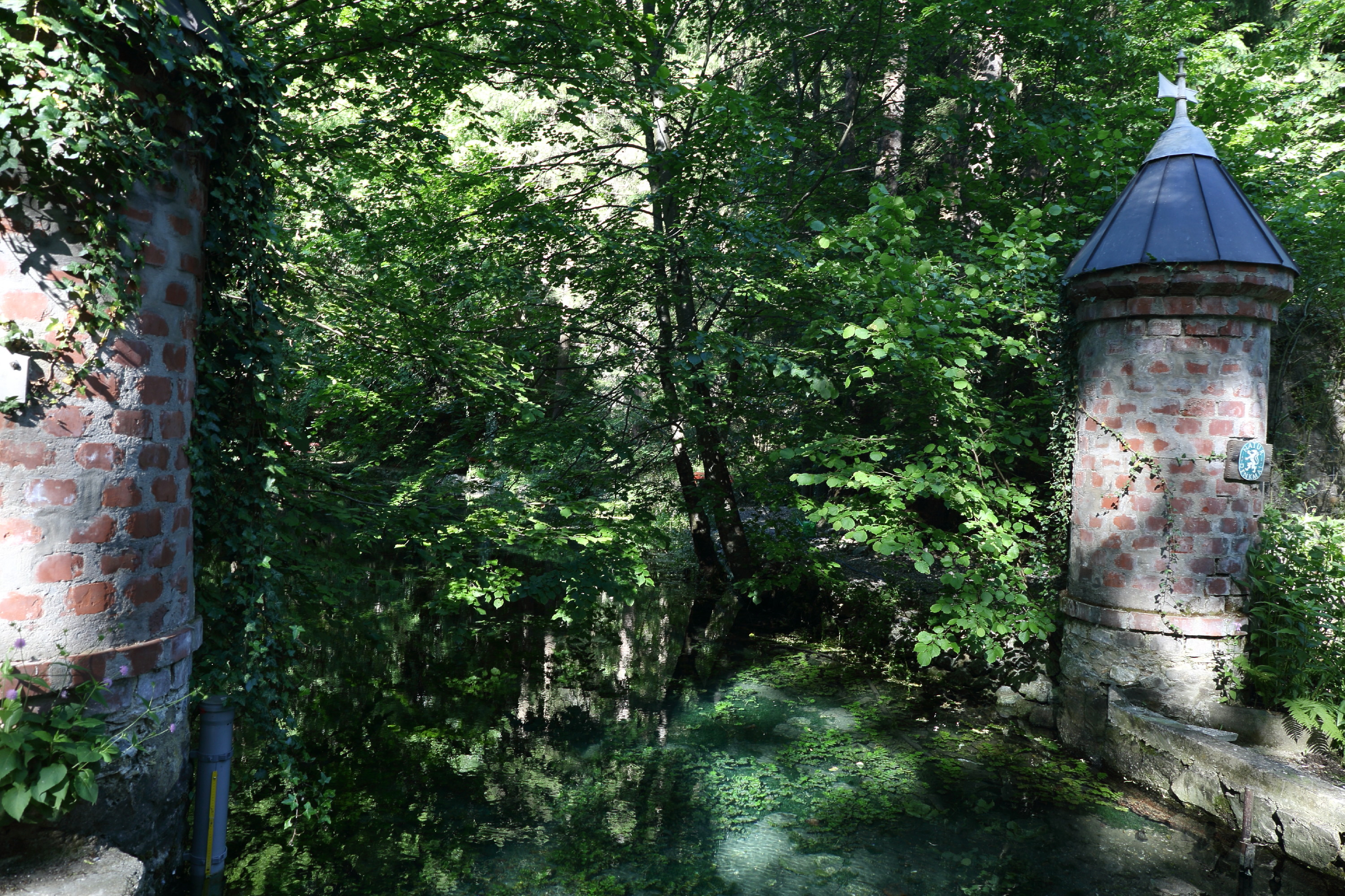 Karstquelle Andritz-Ursprung This media shows the natural monument in Styria with the ID 588.